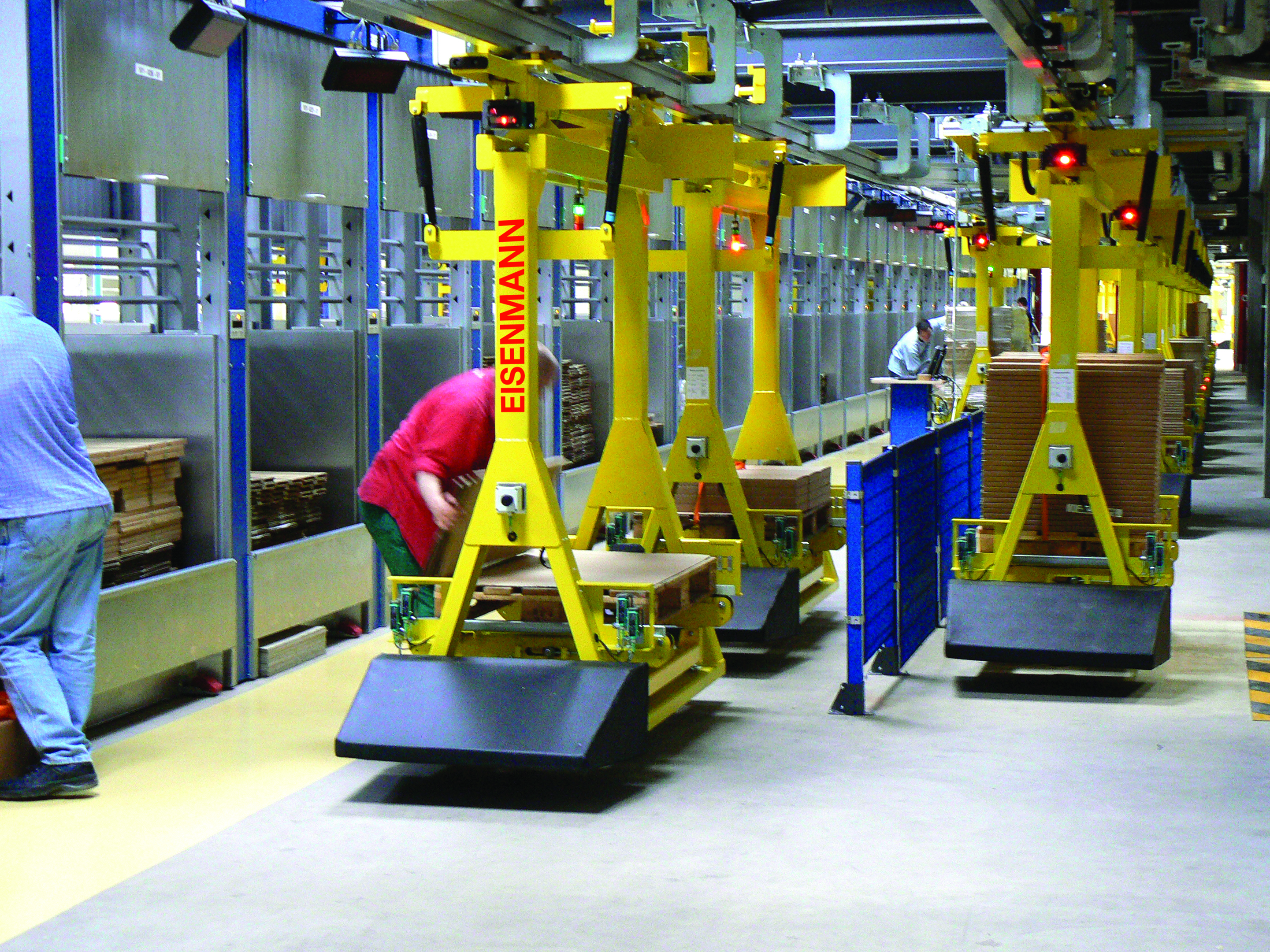 Elektrohängebahn von Eisenmann.